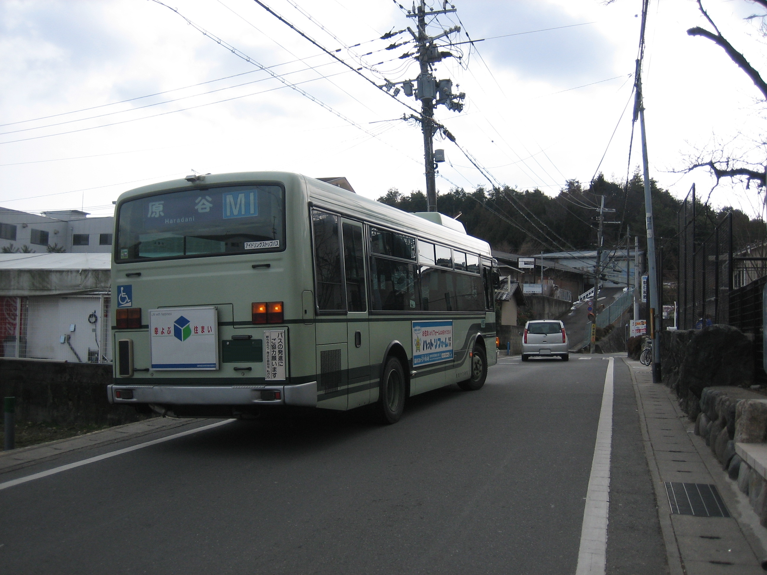 京都市北区大北山原谷乾町から地域内を運行する市バスを撮影